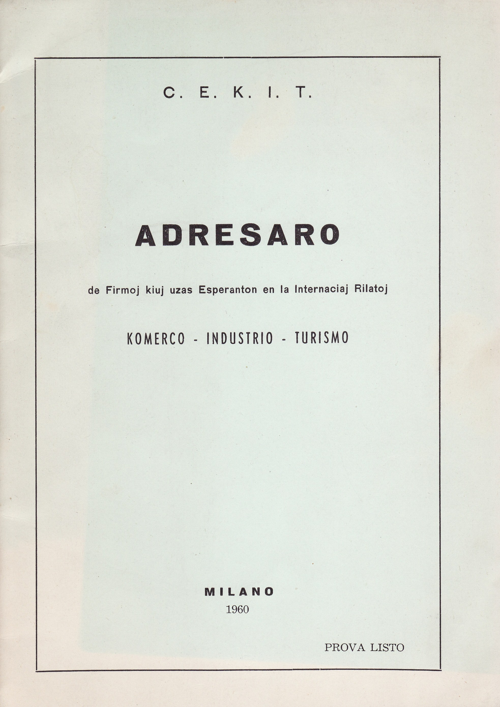 Adresaro de Firmoj kiuj uzas Esperanton en la Internaciaj Rilatoj, 1960